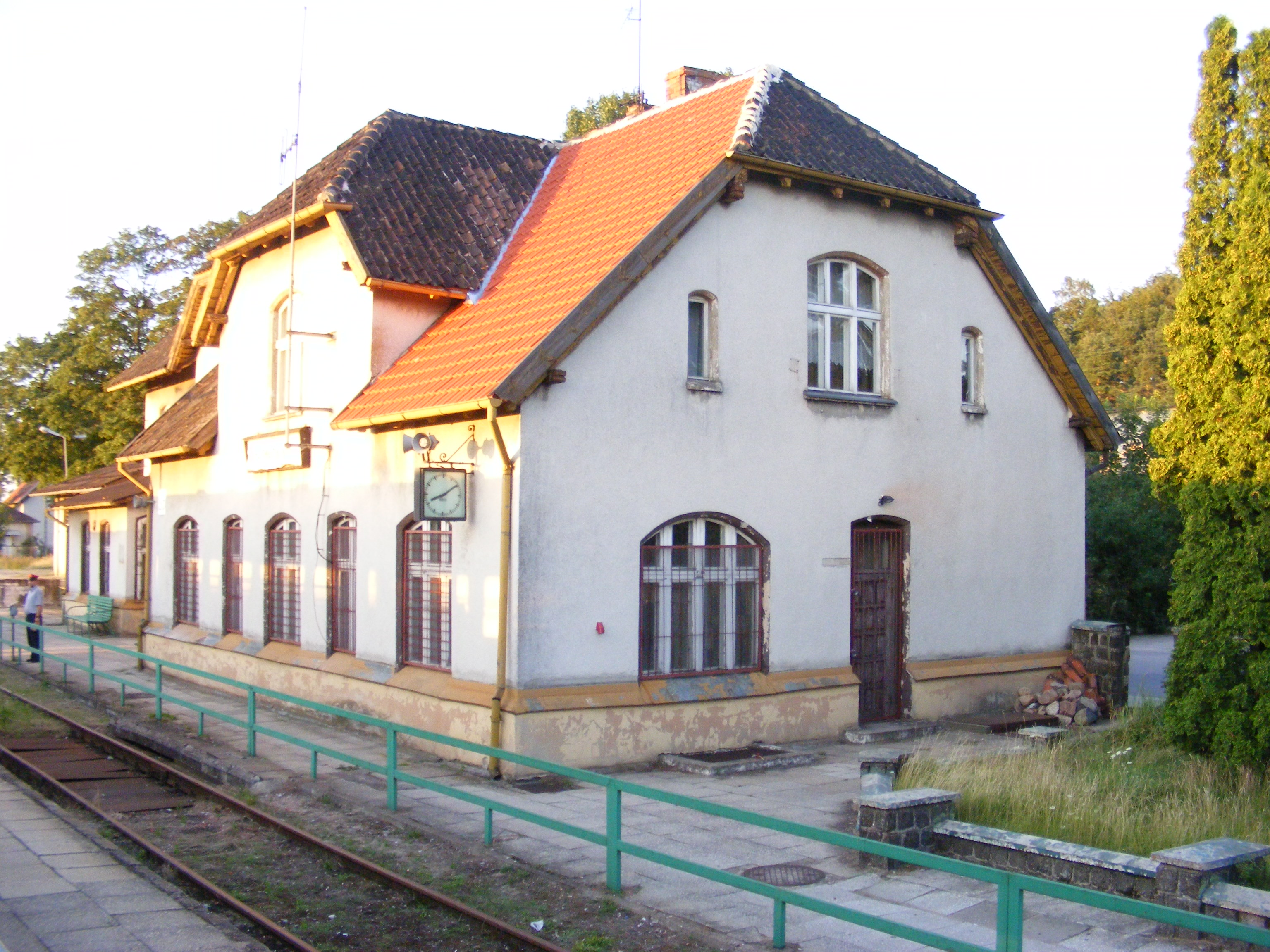 Stacja kolejowa Somonino (woj. pomorskie)